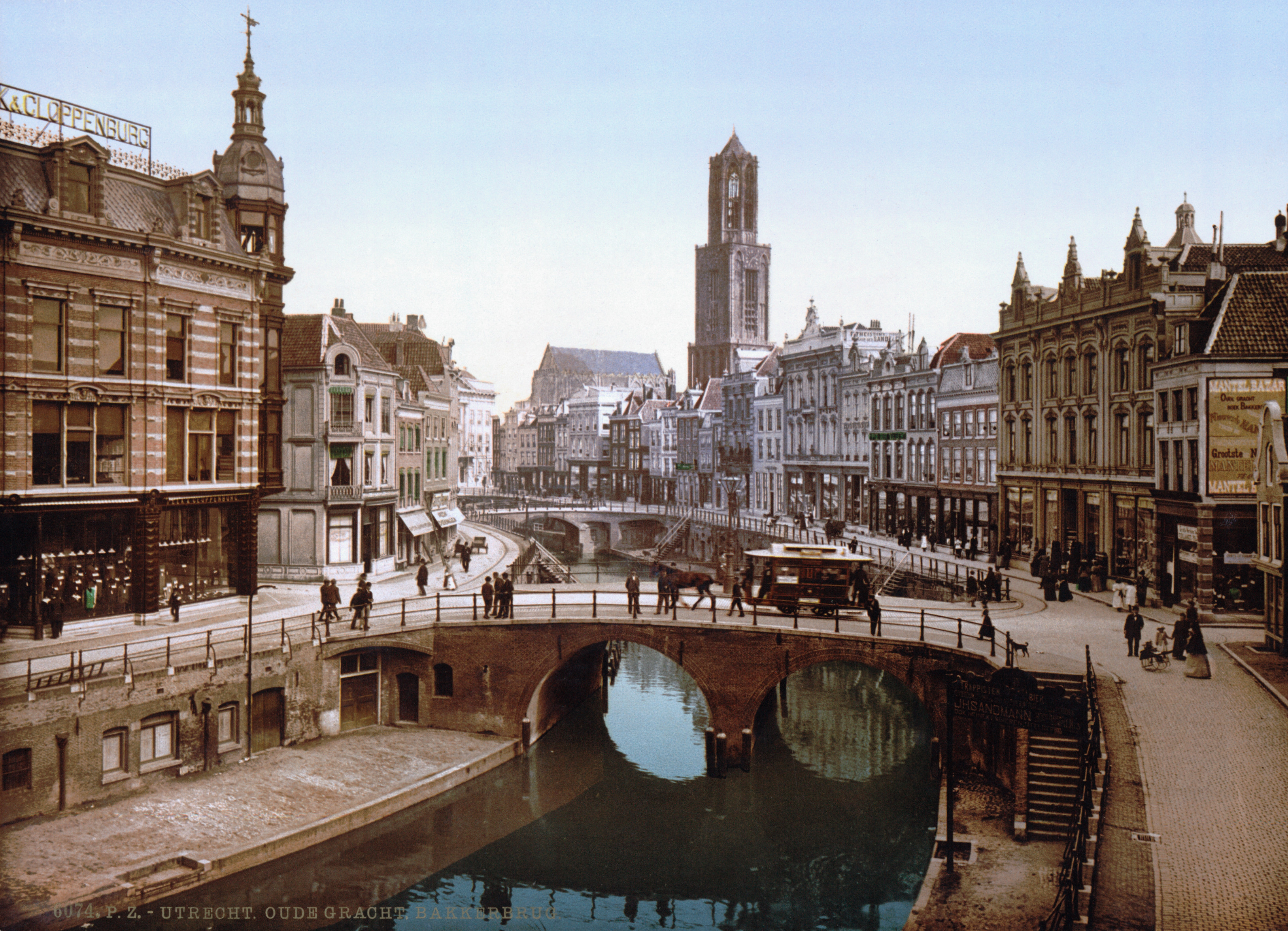 Utrecht - Oude Gracht en Bakkerbrug